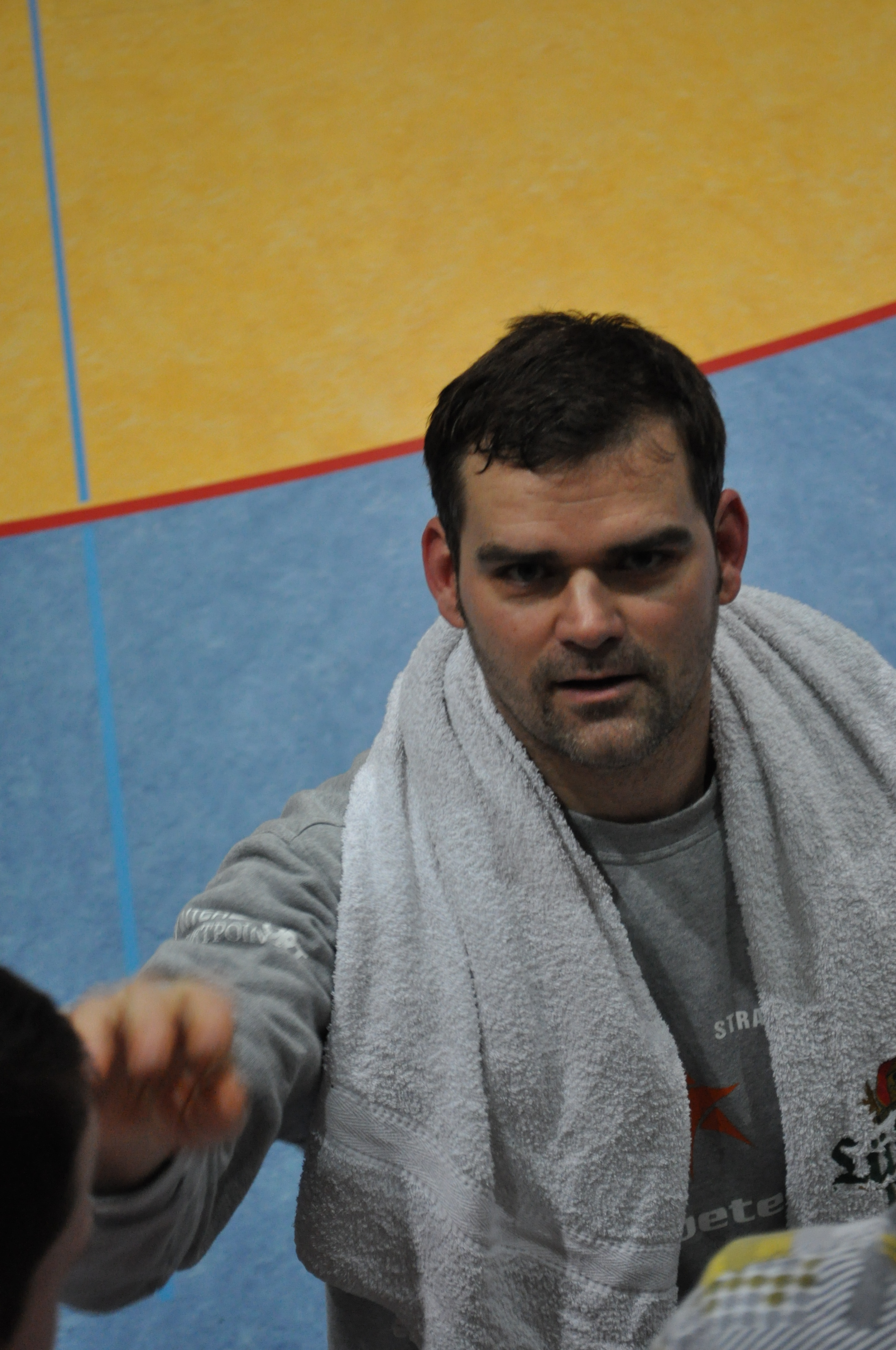 Enrico Ney vom Stralsunder HV, nach dem Spiel gegen die HSG Uni Greifswald (44:8) am 7.2.2010 in der Stralsunder Diesterweg-Halle